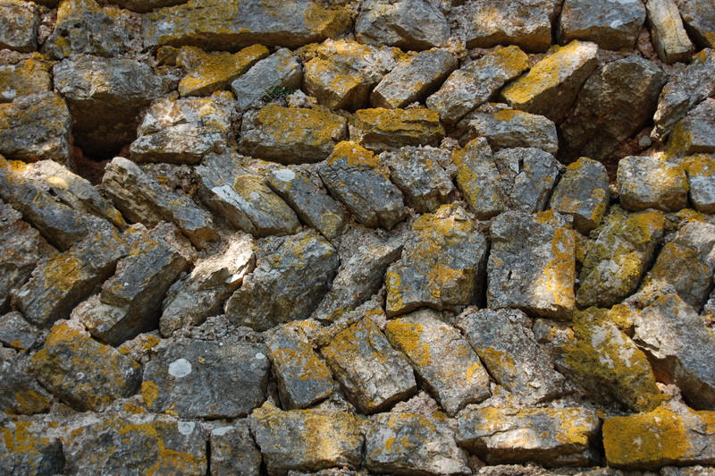 Castillo Puig del Castilloot